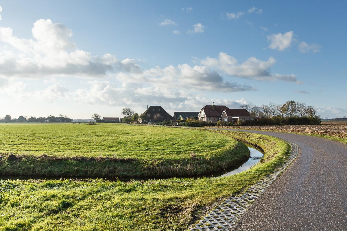 Tjallewal, Schagen, Noord Holland, Netherlands